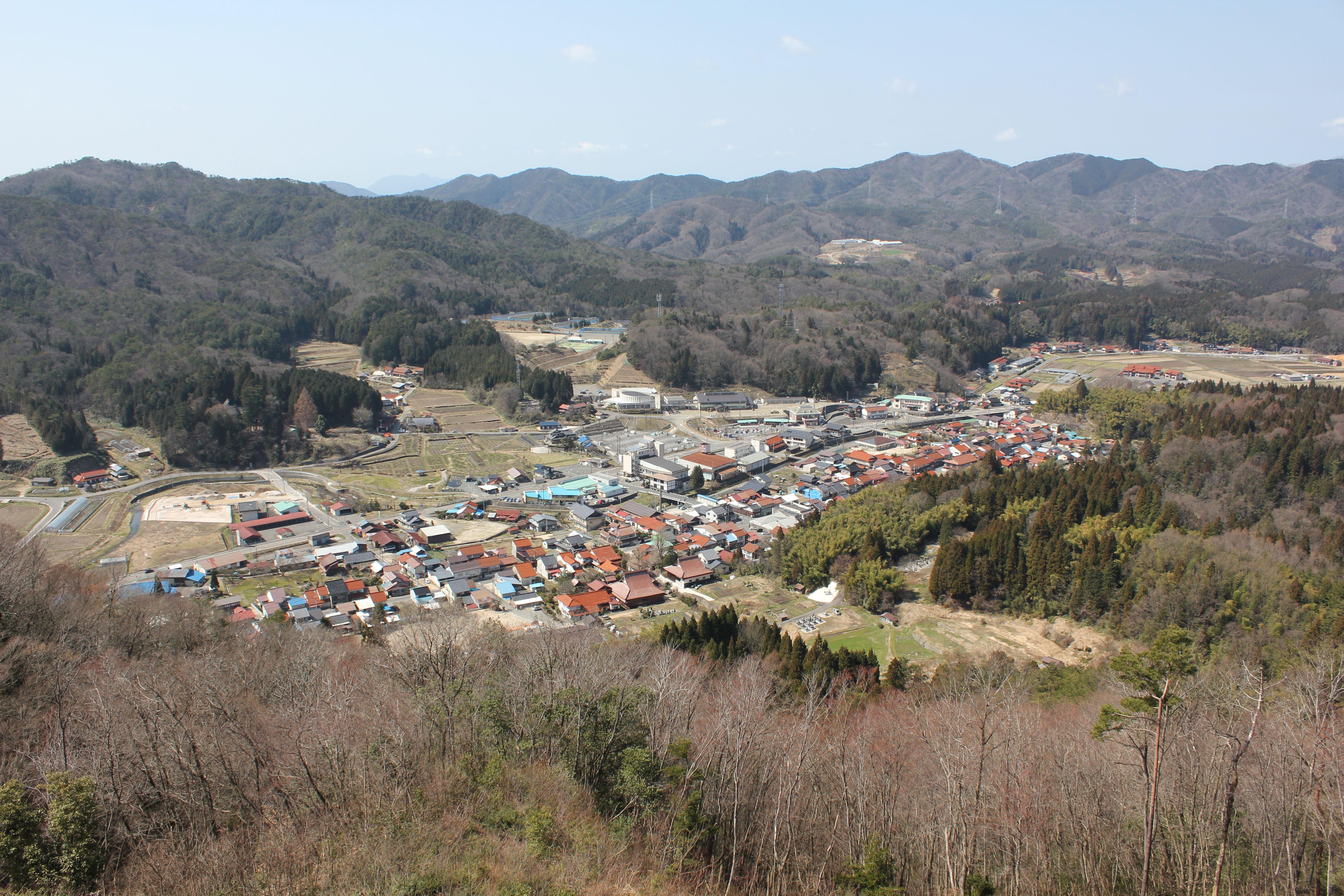 島根県飯南町、赤穴城から市街地の眺望